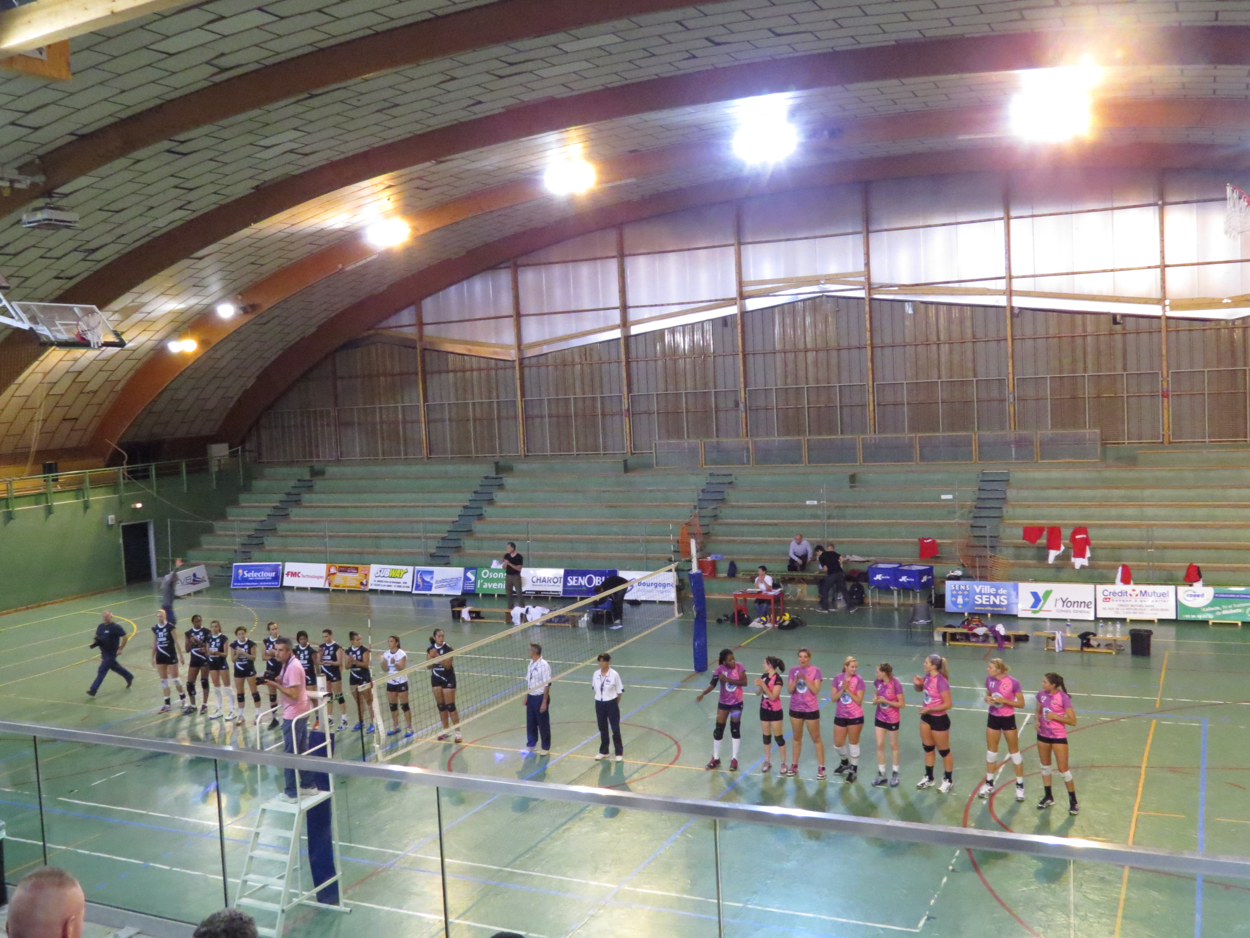 Match de volleyball féminin, Championnat Elite (D2), 5 Octobre 2013 Match entre Sens et Laon à Sens (89) Victoire 3-2 de Sens